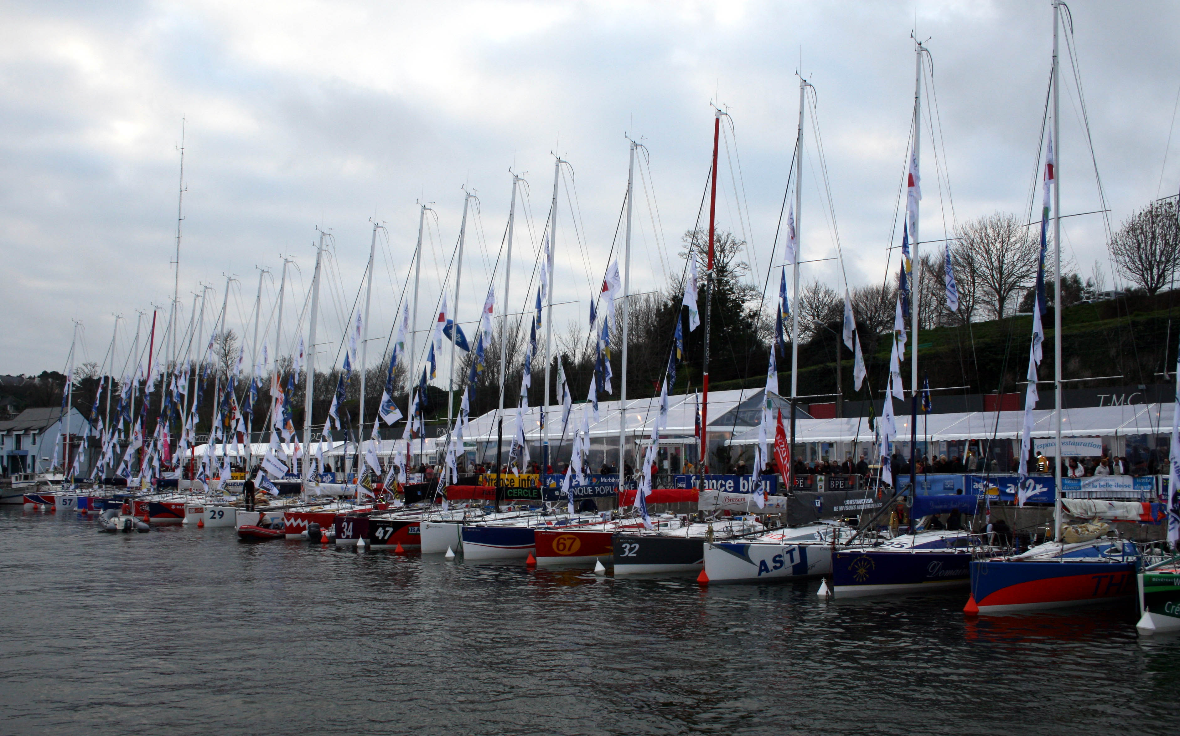 Description =Le trophée BPE dans le bassin à flot à Belle-Ile Source =Photo taken by Remi Jouan Date =Mars 2007 Author =Remi Jouan